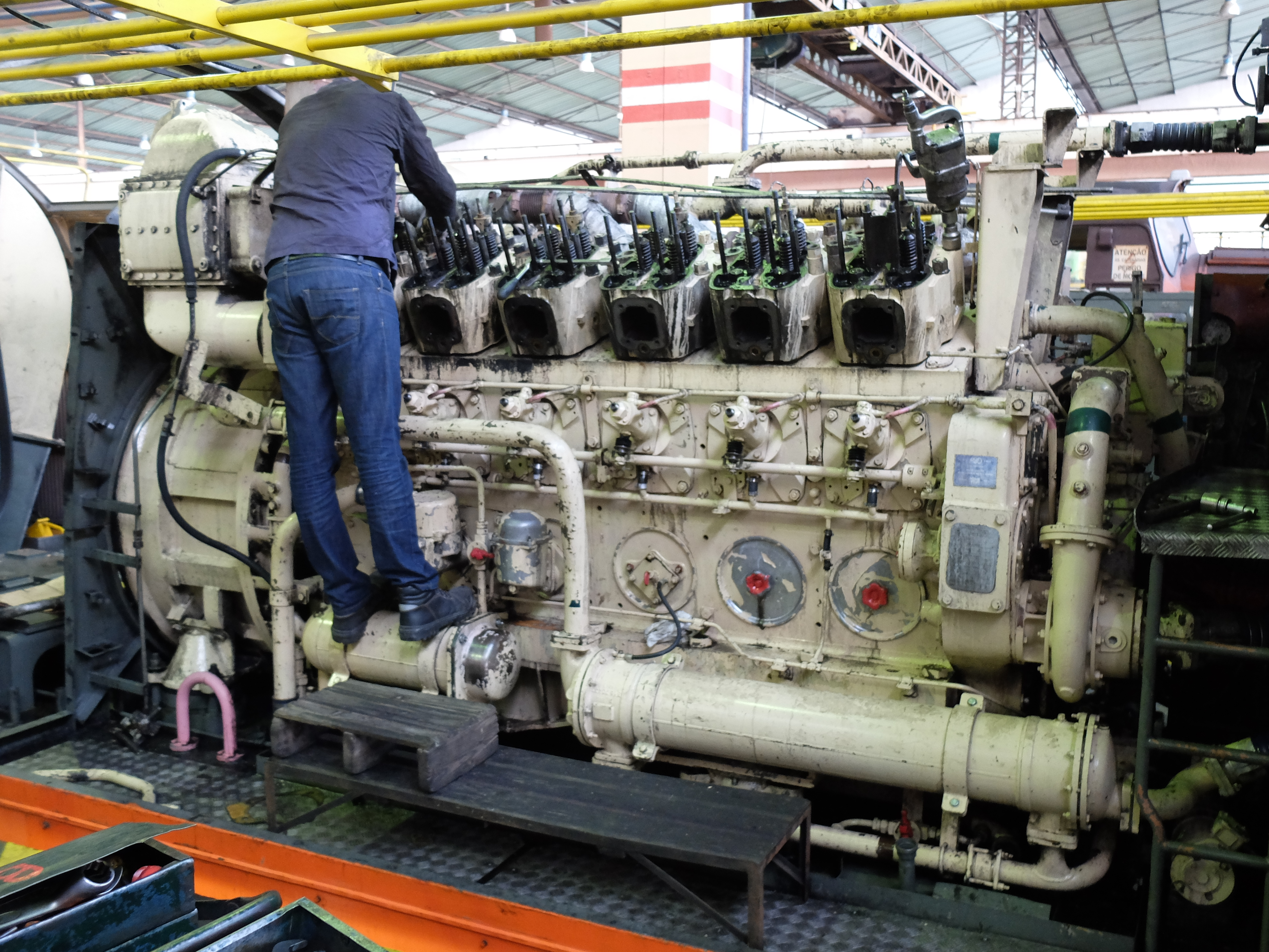 Wartung des Motors SACM AGO - V 12 DSHR der Lokomotive CP 1909 in Entroncamento.